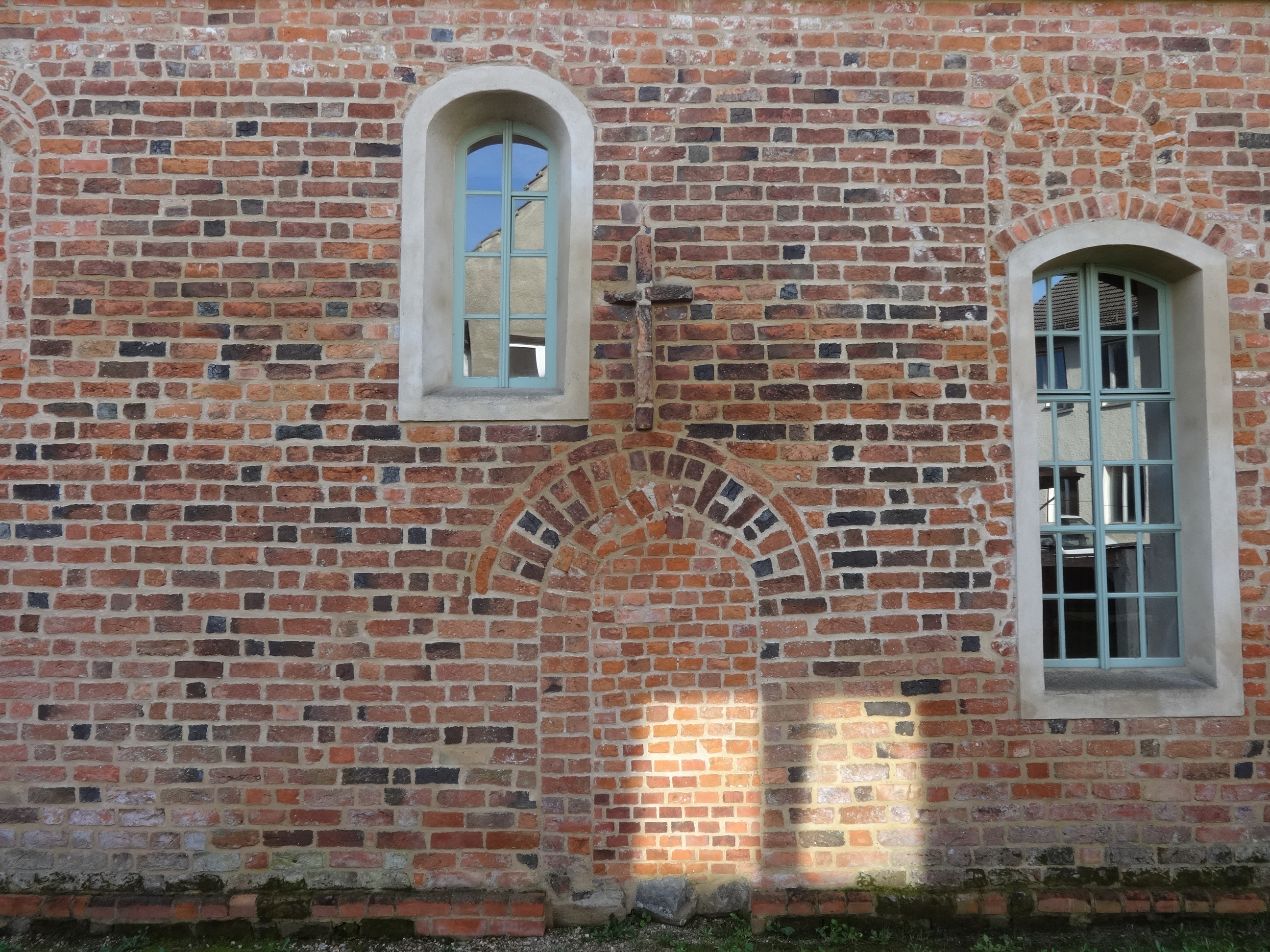 Dorfkirche Bardenitz: Kirche aus der ersten Hälfte des 13. Jahrhunderts, der als einziger Sakralbau in der Region aus Backstein errichtet wurde. Das Bauwerk wurde mehrfach umgebaut. Im 15. Jahrhundert riss die Kirchengemeinde die Apsis sowie die Nord- und Ostseite des Chores ab. Die Südwand blieb stehen und ist heute noch erhalten. Der Chor wurde mit einem geraden Abschluss neu errichtet, höher gezogen und überragte seither das Kirchenschiff. Im Innern befindet sich ein Altaraufsatz aus dem Jahr 1721, der die Kreuzigung Christi zeigt. In der Sakristei steht darüber hinaus ein Flügelaltar aus den 1960er Jahren vom Kleinmachnower Bildhauer Hermann Lohrisch.